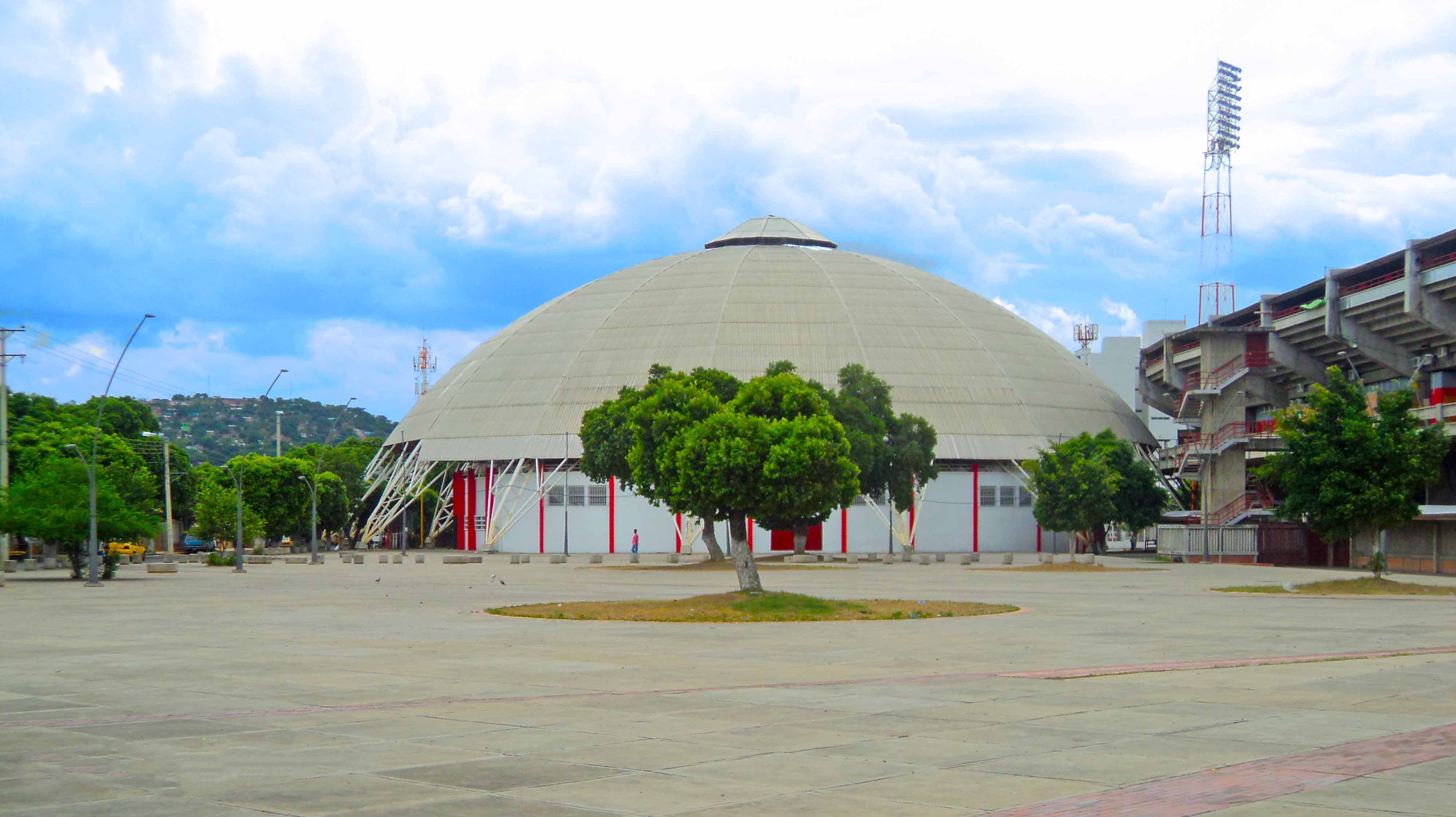 Estadio Toto Hernández, Cúcuta, Norte de Santander